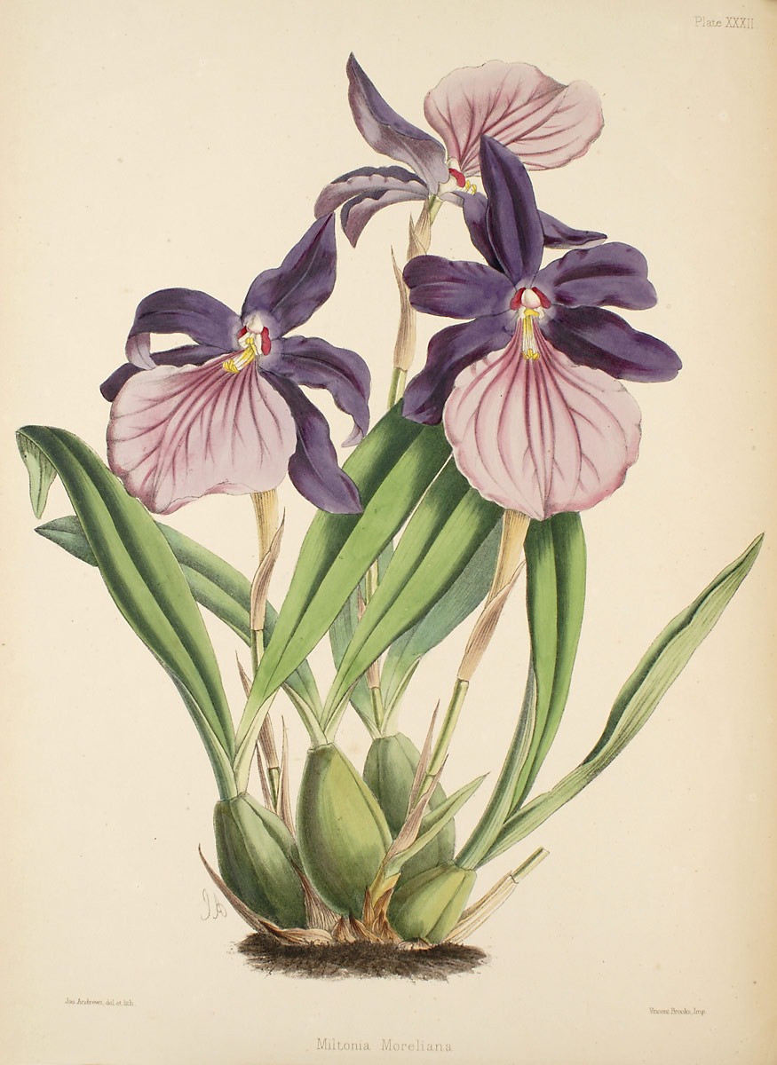 Illustration of Miltonia moreliana